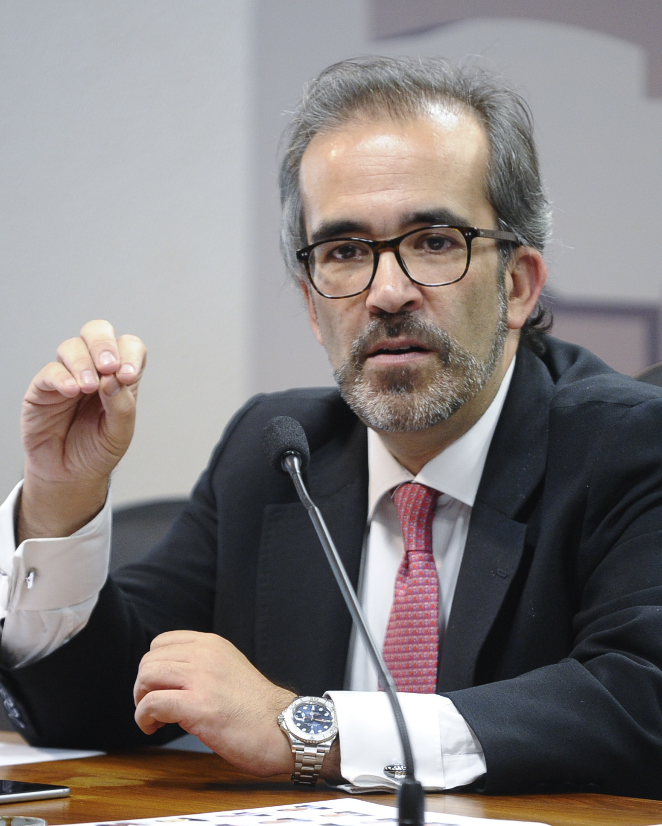 Representação Brasileira no Parlamento do Mercosul recebe a visita da Delegação do Parlamento Europeu para aprofundar debate sobre temas de interesse recíproco. Em pronunciamento, o presidente do Group of the European People’s Party (Christian Democrats) – PPE – Portugal, Paulo Rangel. Foto: Marcos Oliveira/Agência Senado